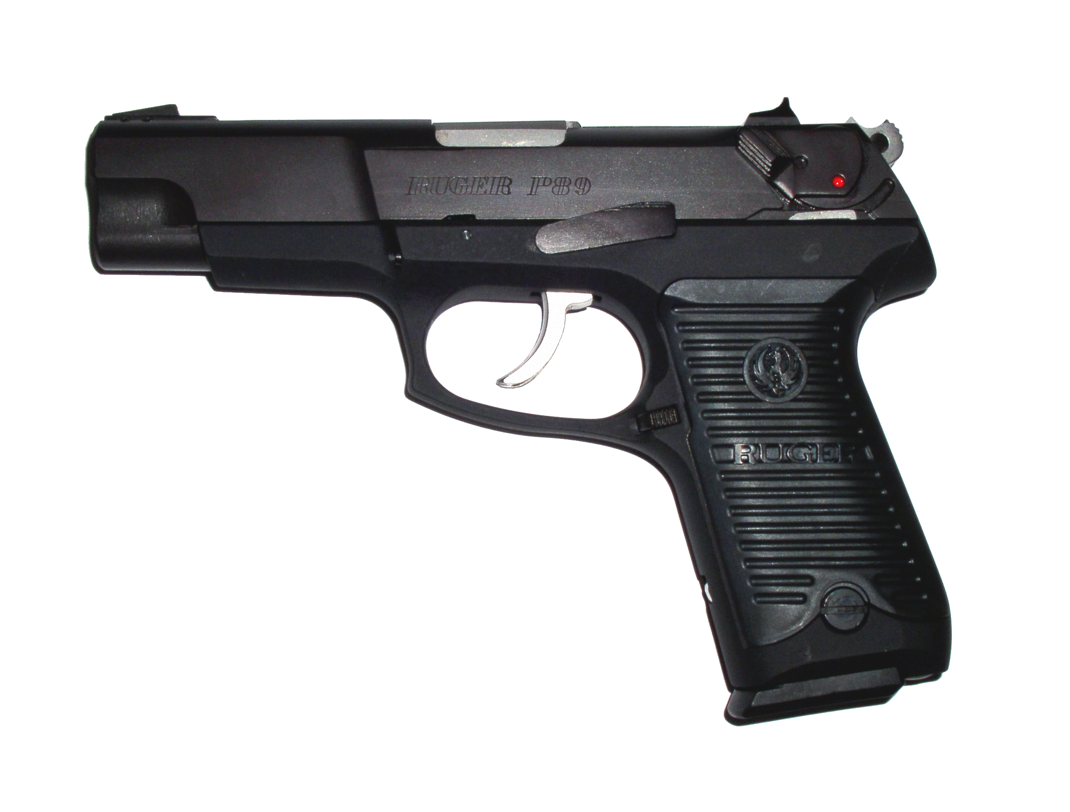 A standard Ruger P89.